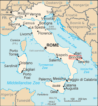 Oorspronkelijk uit CIA Factbook; vertaald in Nederlands door Danielm; omgezet in PNG door BenTels, enkel plaatsnaam met rood gemarkeerd door mij